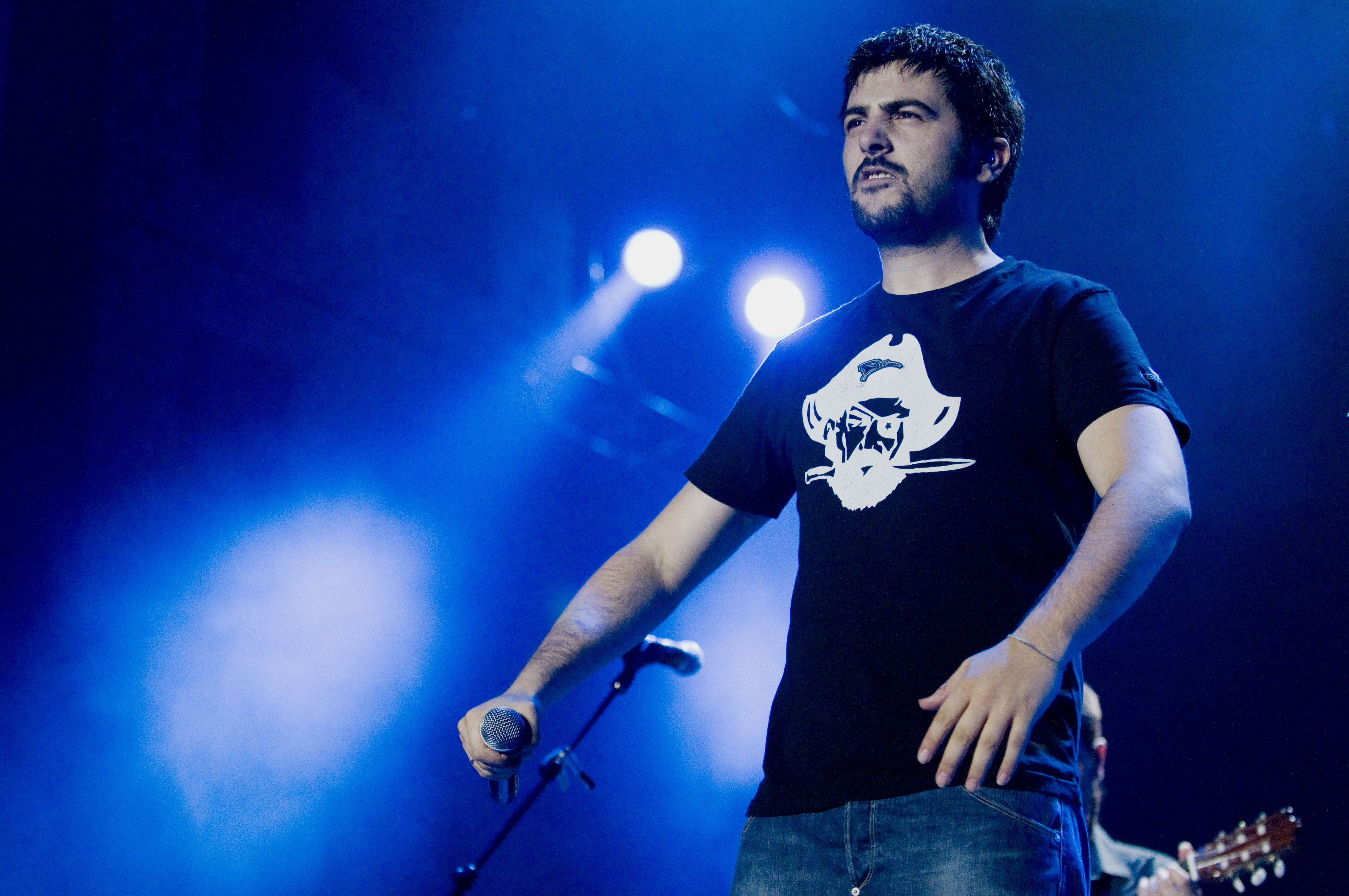 Estopa